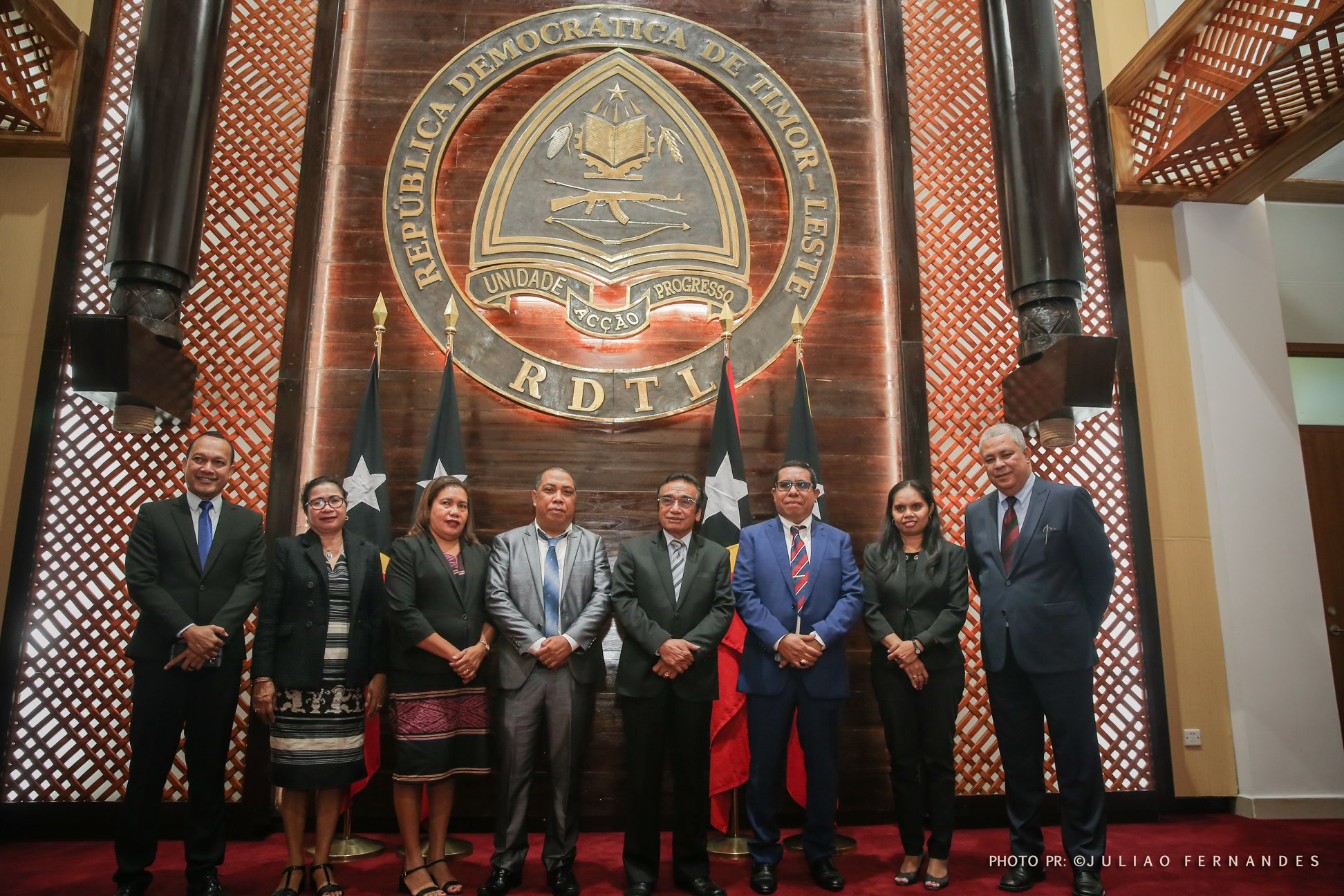 PLP-Vertreter bei Francisco Guterres